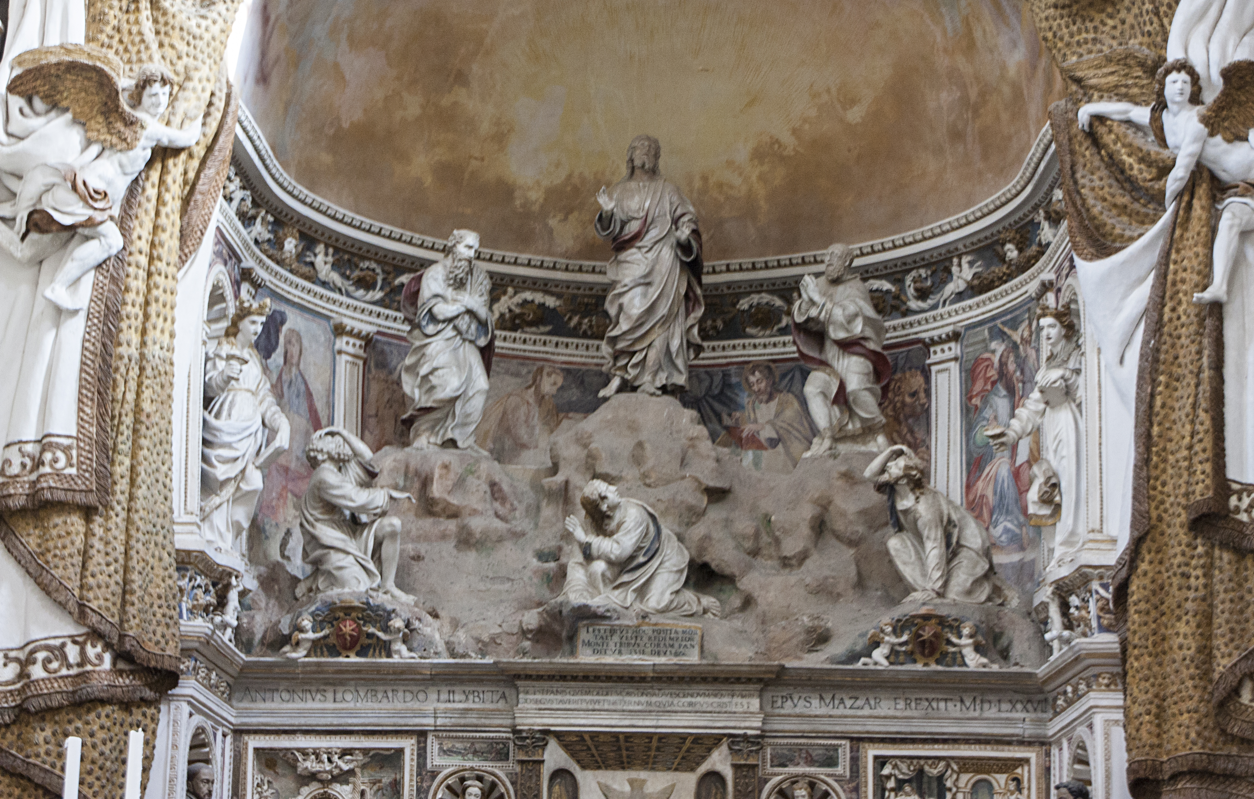 Trasfigurazione sul monte Tabor di Antonello Gagini